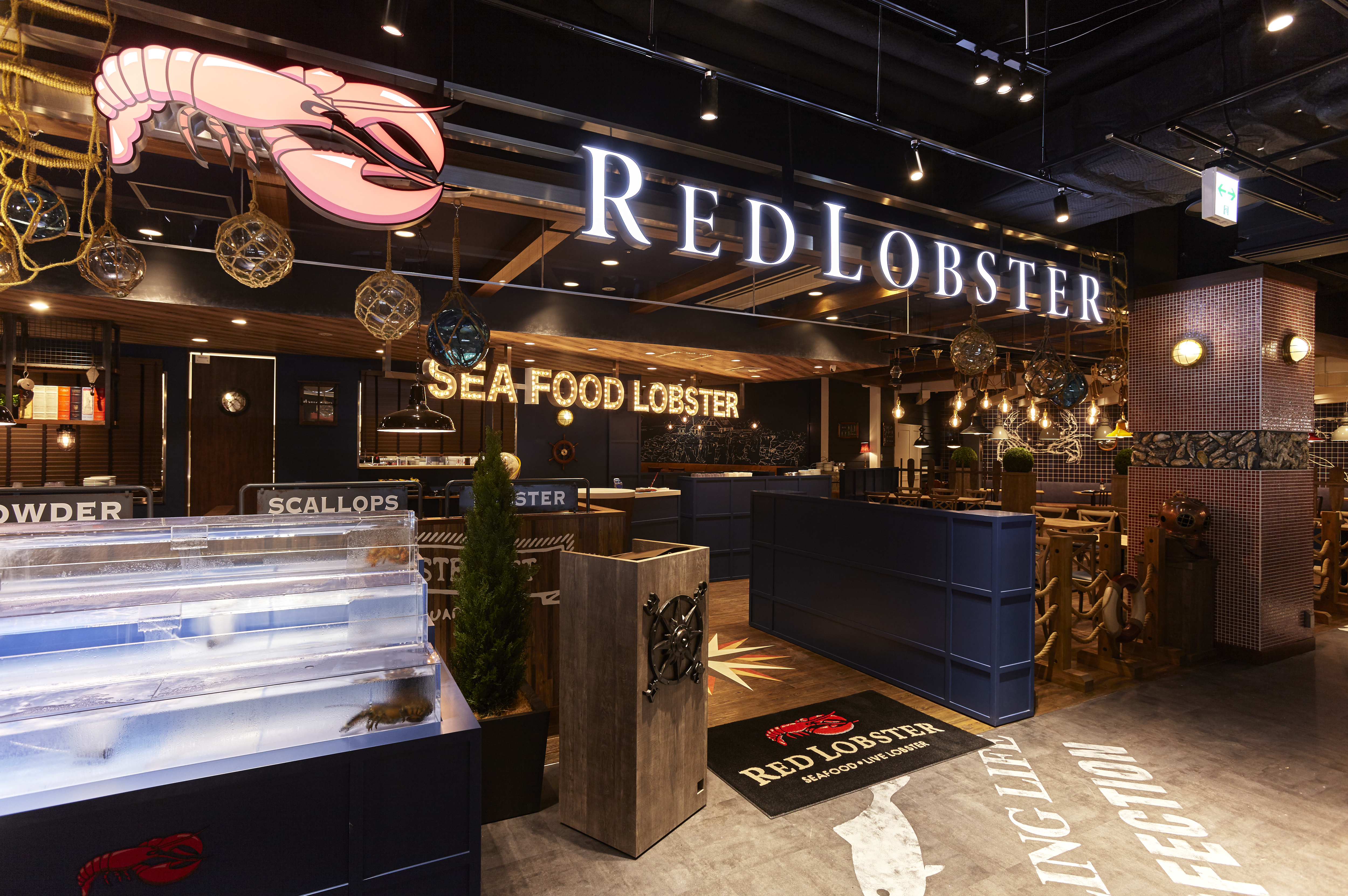 レッドロブスター舞浜イクスピアリ店の外観